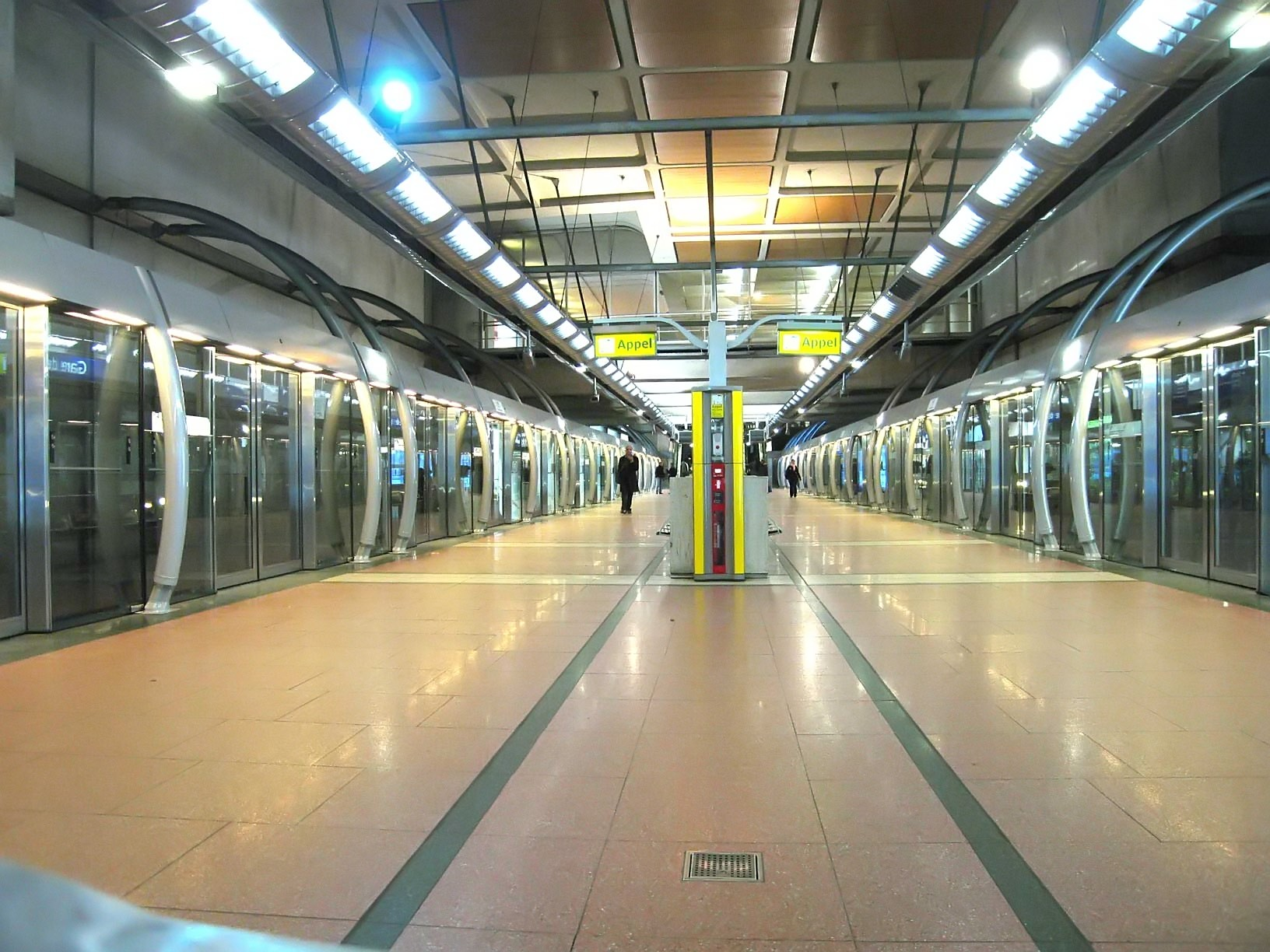 Métro de Paris, Station Gare de Lyon (ligne 14), Paris, France